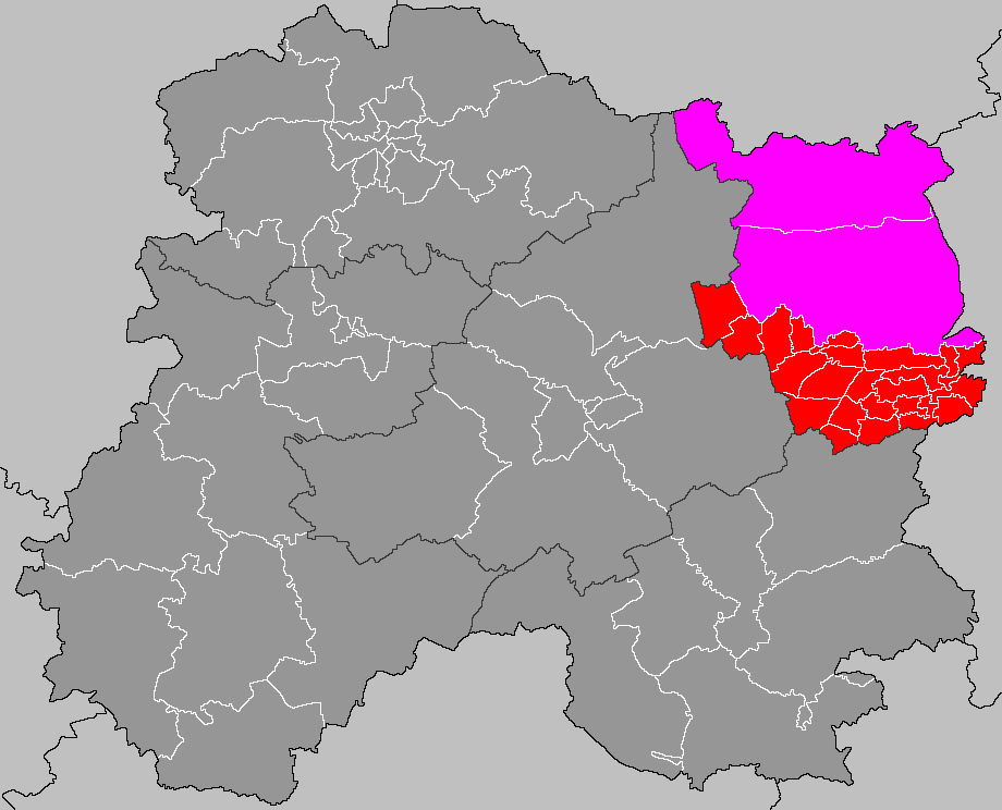 Localisation du canton de Givry-en-Argonne